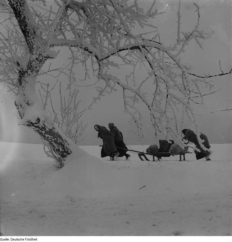 Original image description from the Deutsche Fotothek 3 Frauen transportieren auf einem Schlitten Brennstoff und Lebensmittel